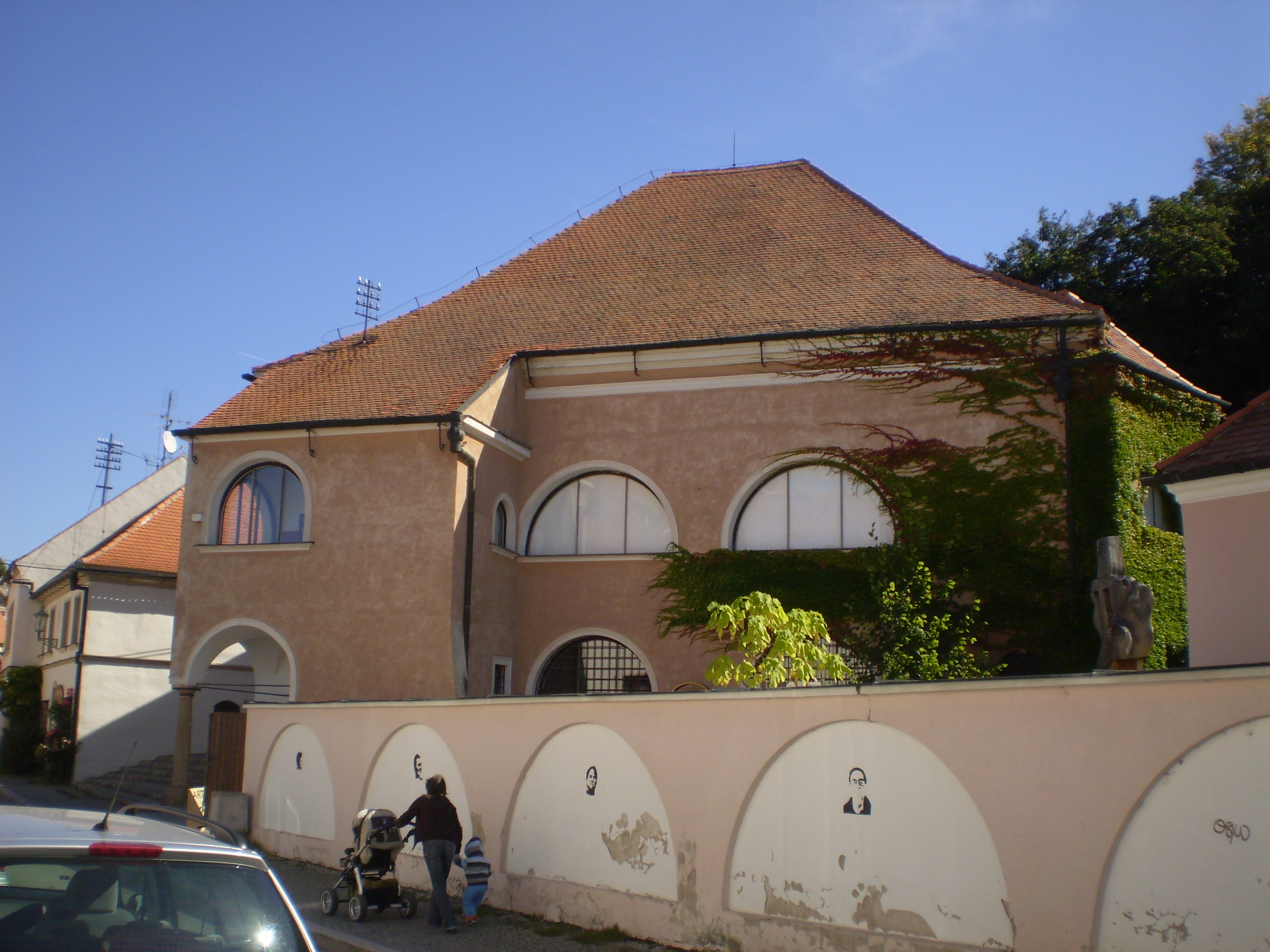 Synagoga v Mikulově na Husově ulici.